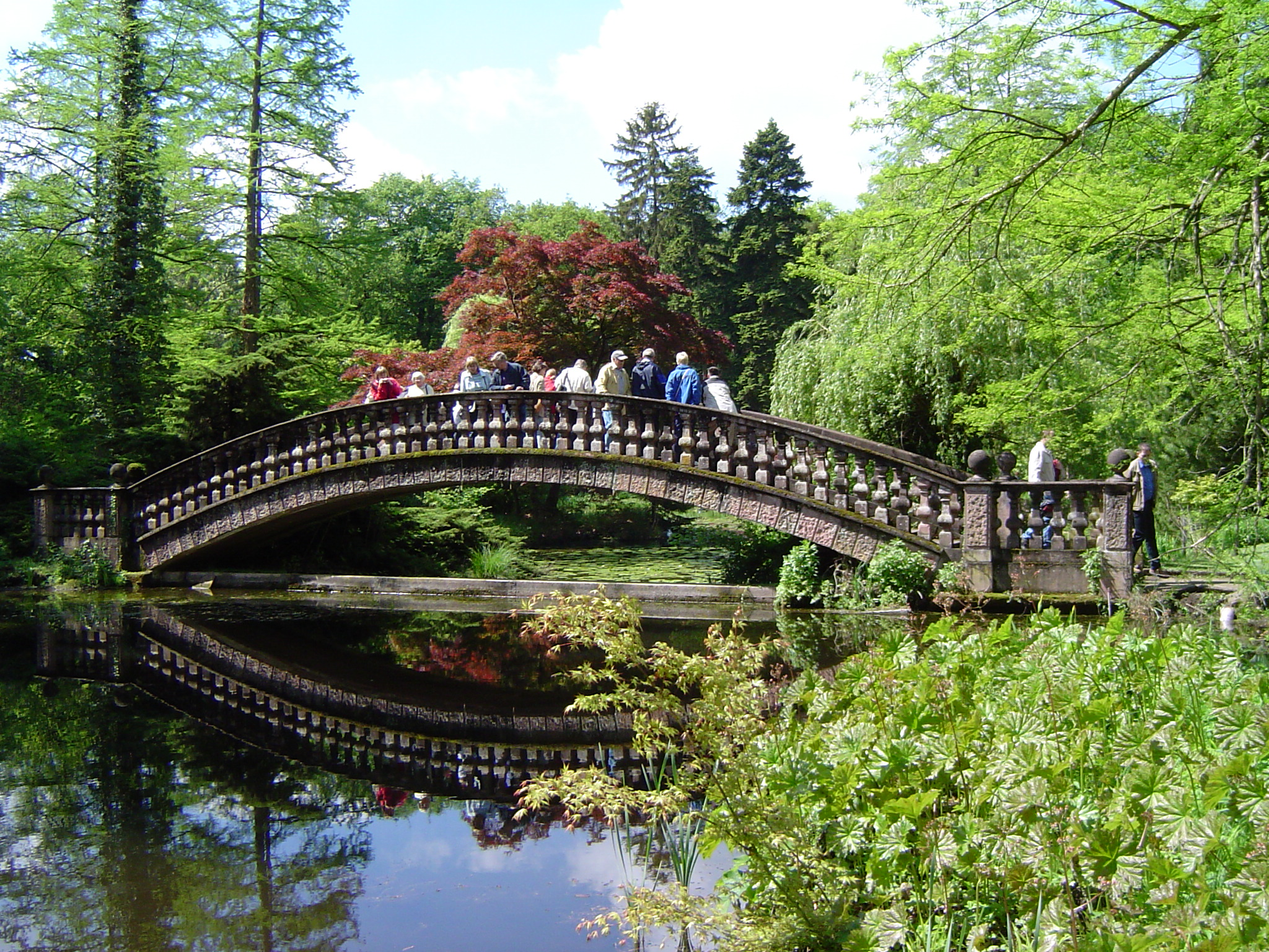 Schloss Wolfsgarten bei Langen (Hessen), Brücke über den Schlossteich